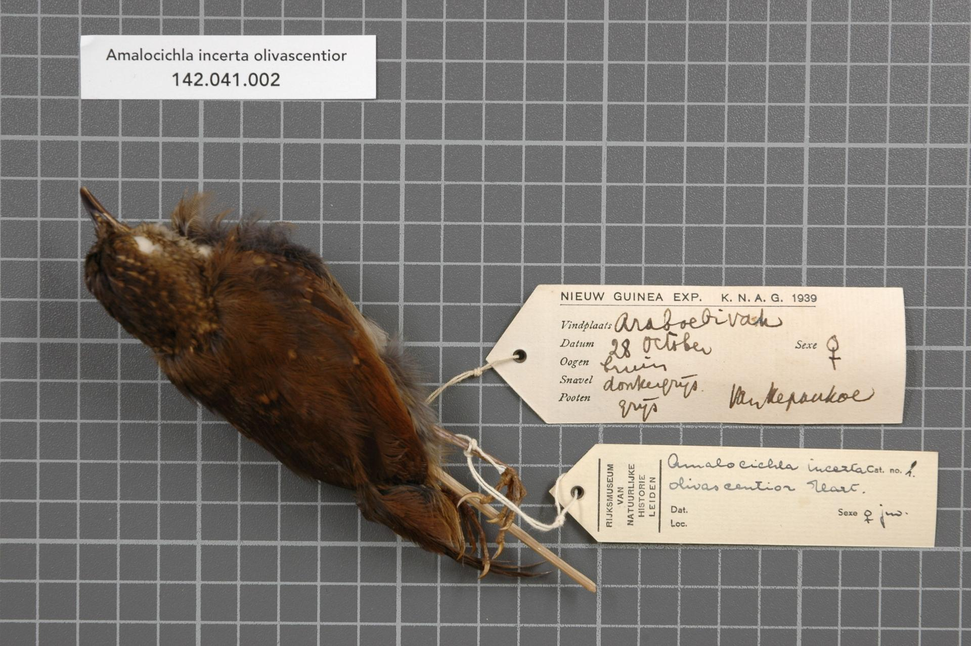 Amalocichla incerta olivascentior Hartert, 1930